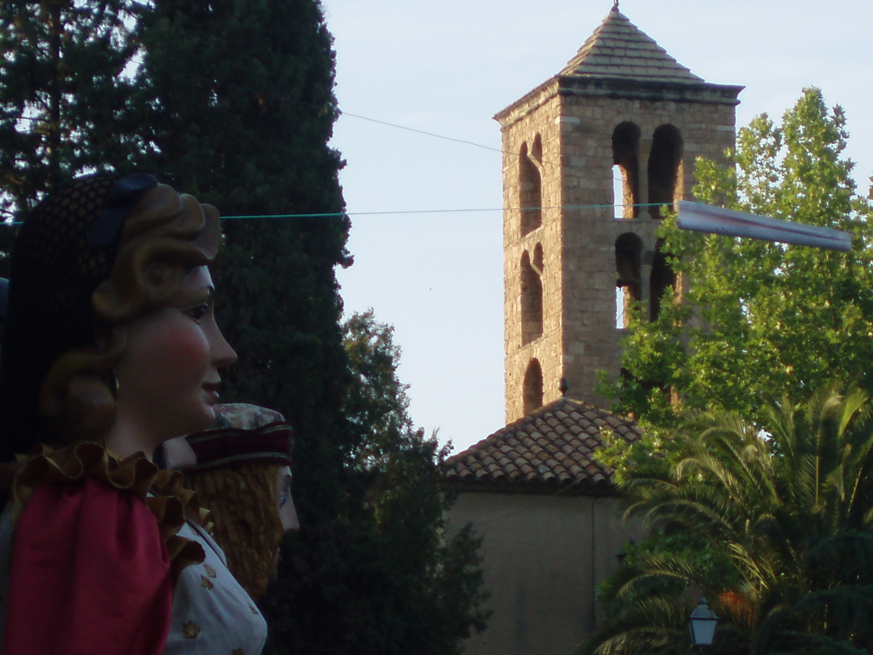 Gigantes junto a la Iglesia de Sant Pere Abrera, en la provincia de Barcelona (España)